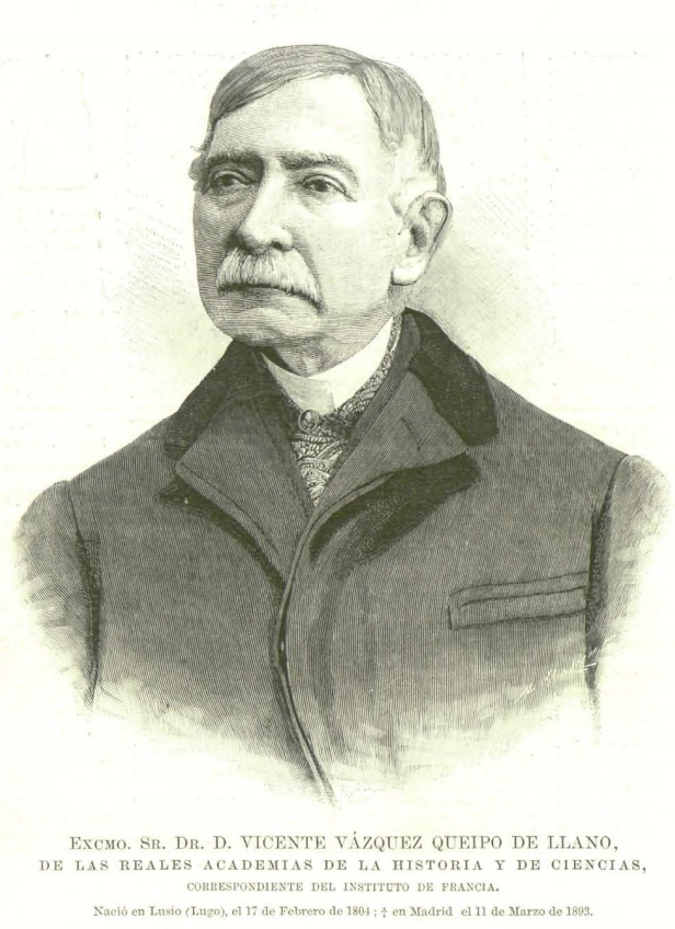 Retrato de Vicente Vázquez Queipo de Llano, recogido en la revista española La Ilustración Española y Americana.